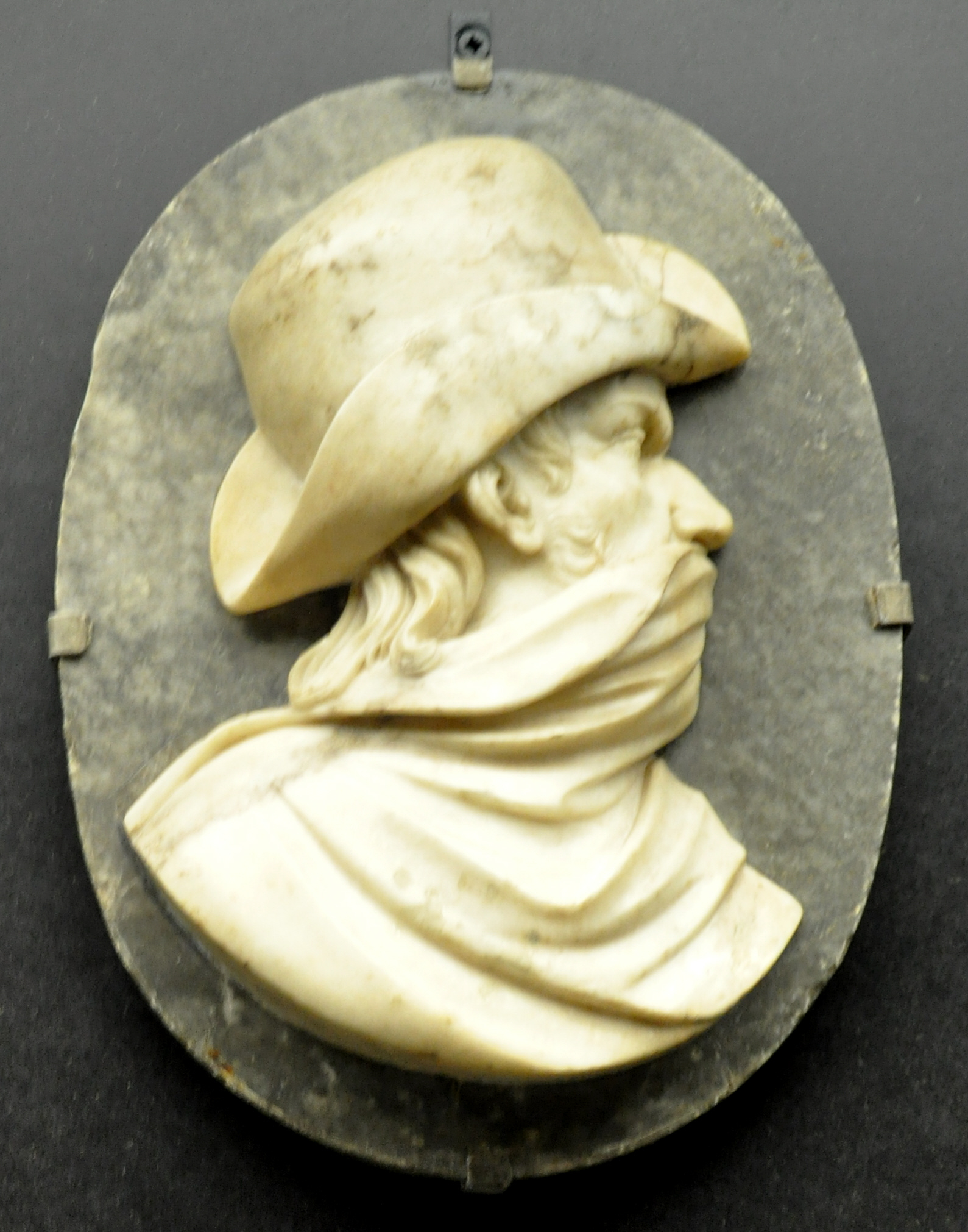 Antonio Canova: Allegorie des Winters; Rom 1779; Marmor Liebieghaus, Frankfurt am Main, Inv. Nr. 1541 (ausgestellt im Schaudepot)